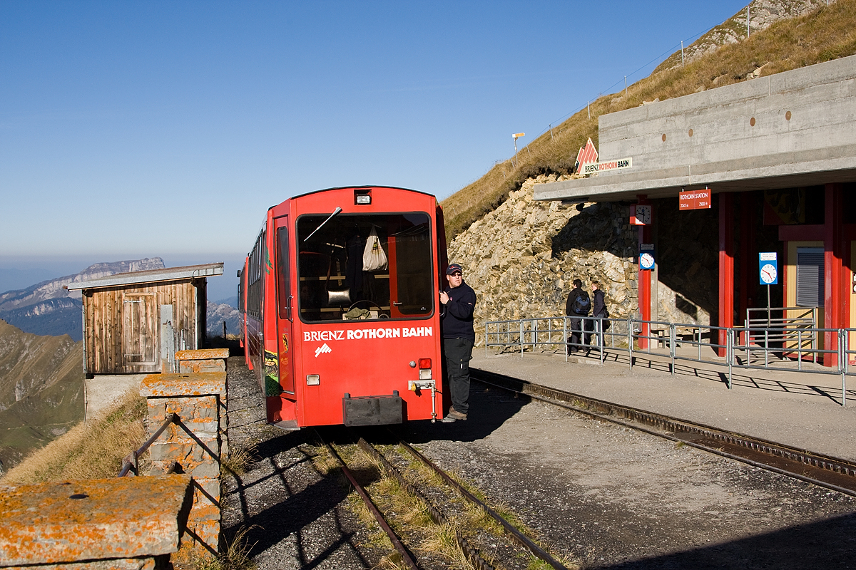 Bahnhof der Brienz-Rothorn-Bahn auf dem Brienzer Rothorn